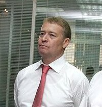 Глава республики Марий Эл Леонид Маркелов. 2010 год